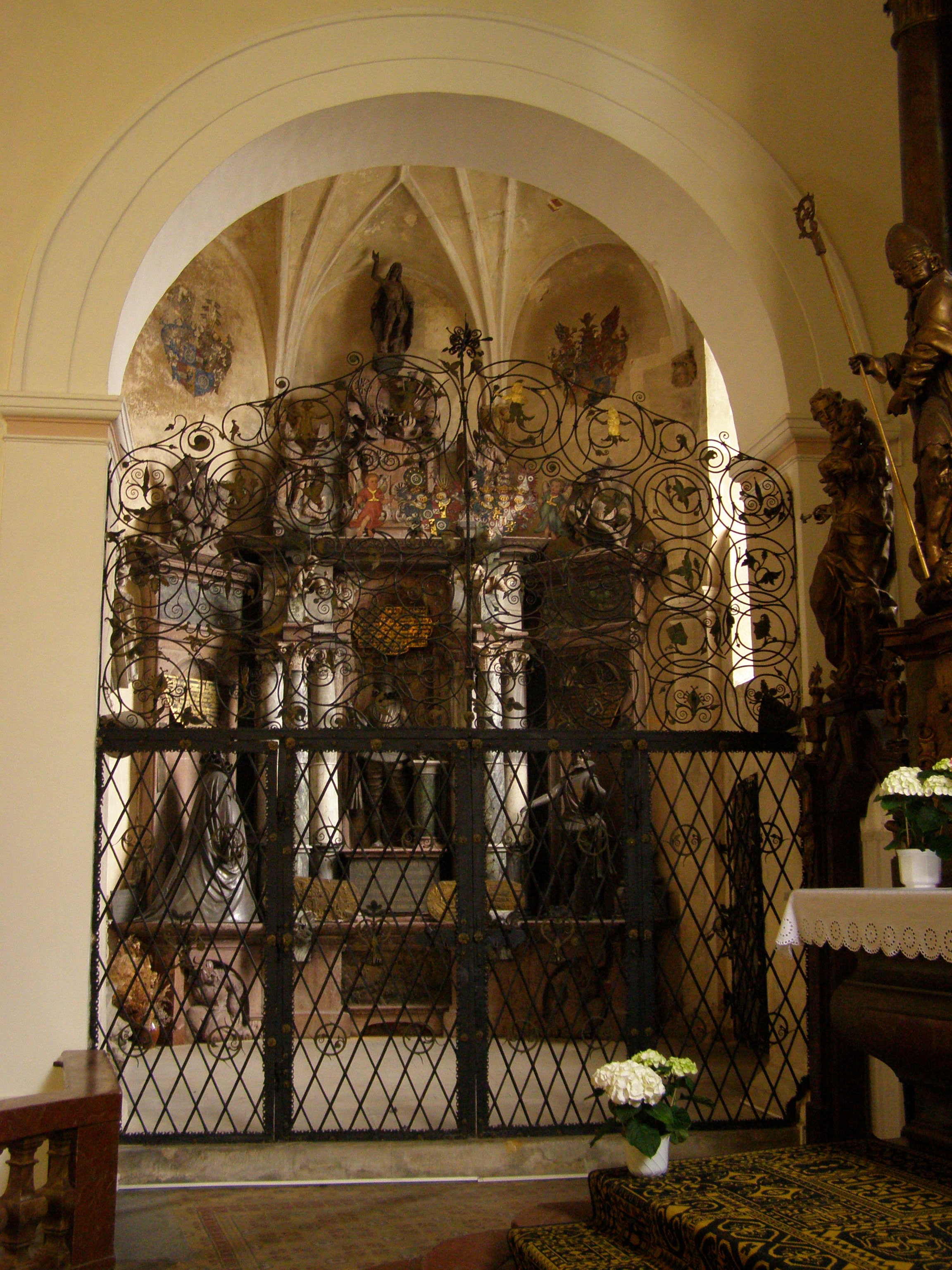 Frýdlant, kostel Nalezení svatého Kříže, boční kaple